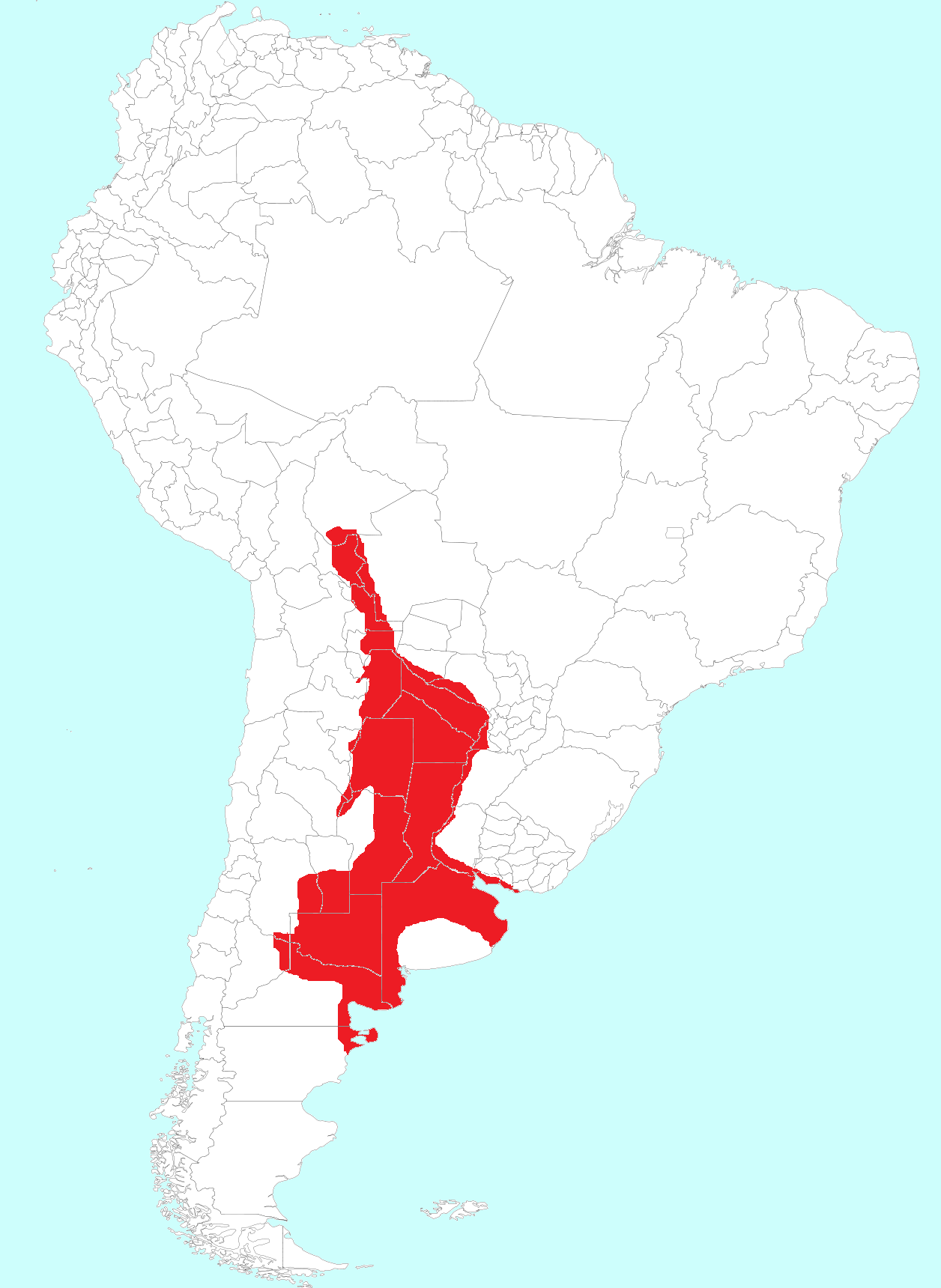 Mar entrerriense o paranaense. Imagen formada en base a la información contenida en las siguientes publicaciones: Hubert, N. y Renno, J. F. 2006. Historical biogeography of South American freshwater fishes. Journal of Biogeography 33: 1414-1436., Cozzuol, M. A. 2006. The Acre vertébrate fauna: Age, diversity, and geography. Journal of South American Earth Science 21: 185-203. , Latrubesse, E.M., Da Silva, S.A.F., Cozzuol, M. y Absy, M.L. 2007. Late Miocene continental sedimentation in southwestern Amazonia and its regional significance: Biotic and geological evidence. Journal of South American Earth Science 23: 61-80.